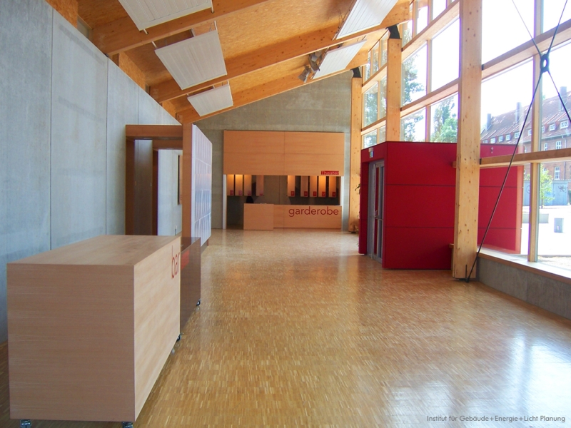 Innenraum des Neuen Foyers Theater Wismar